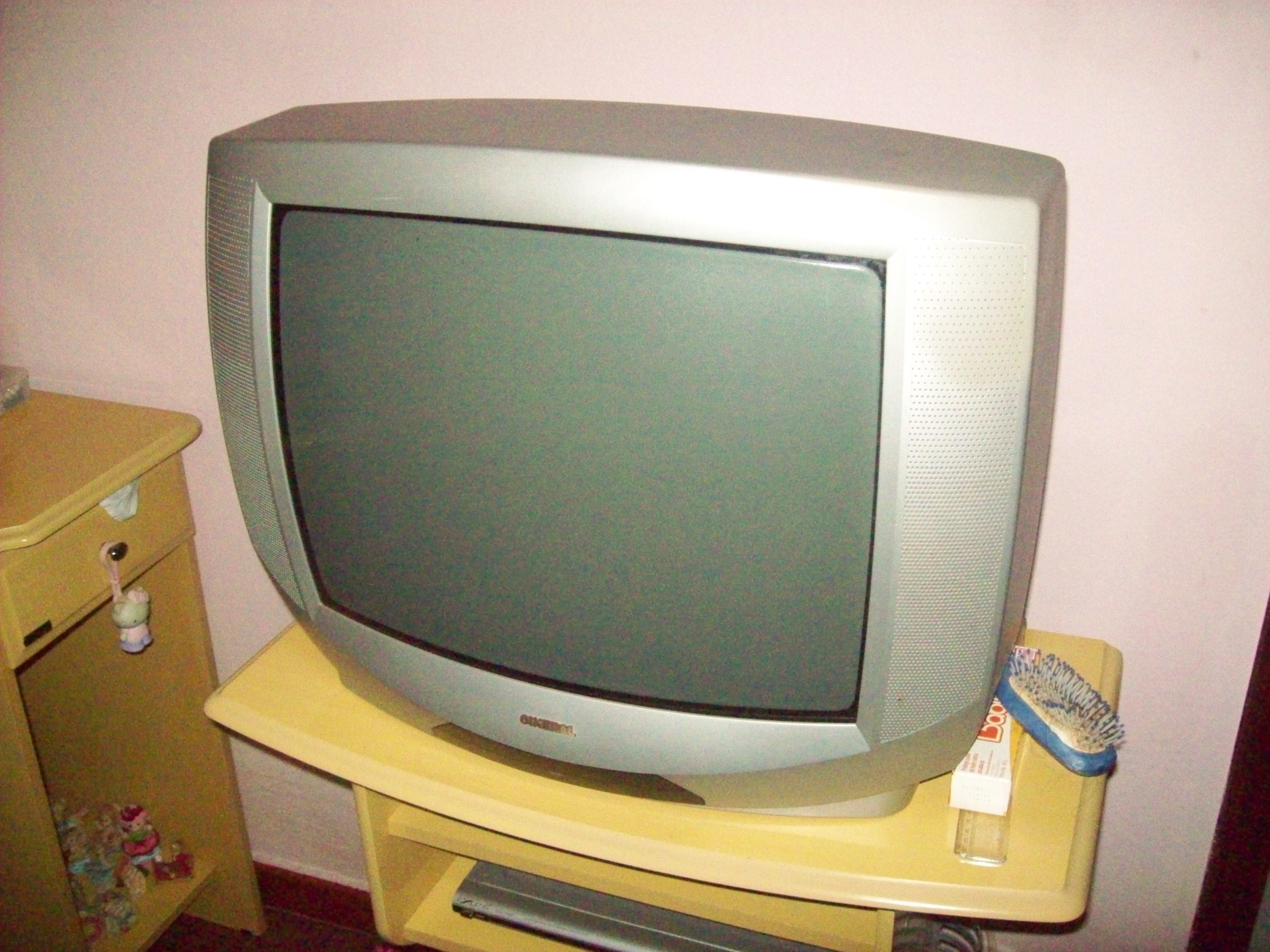 Antigo modelo na TV do Cineral.